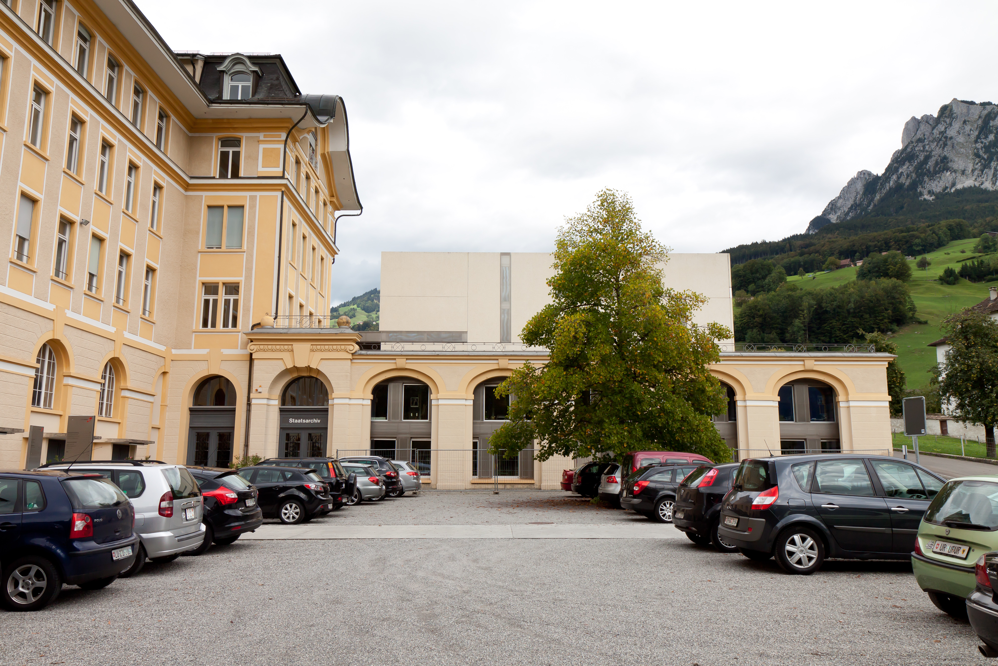 Staatsarchiv Schwyz, Kollegiumstrasse 30, Schwyz